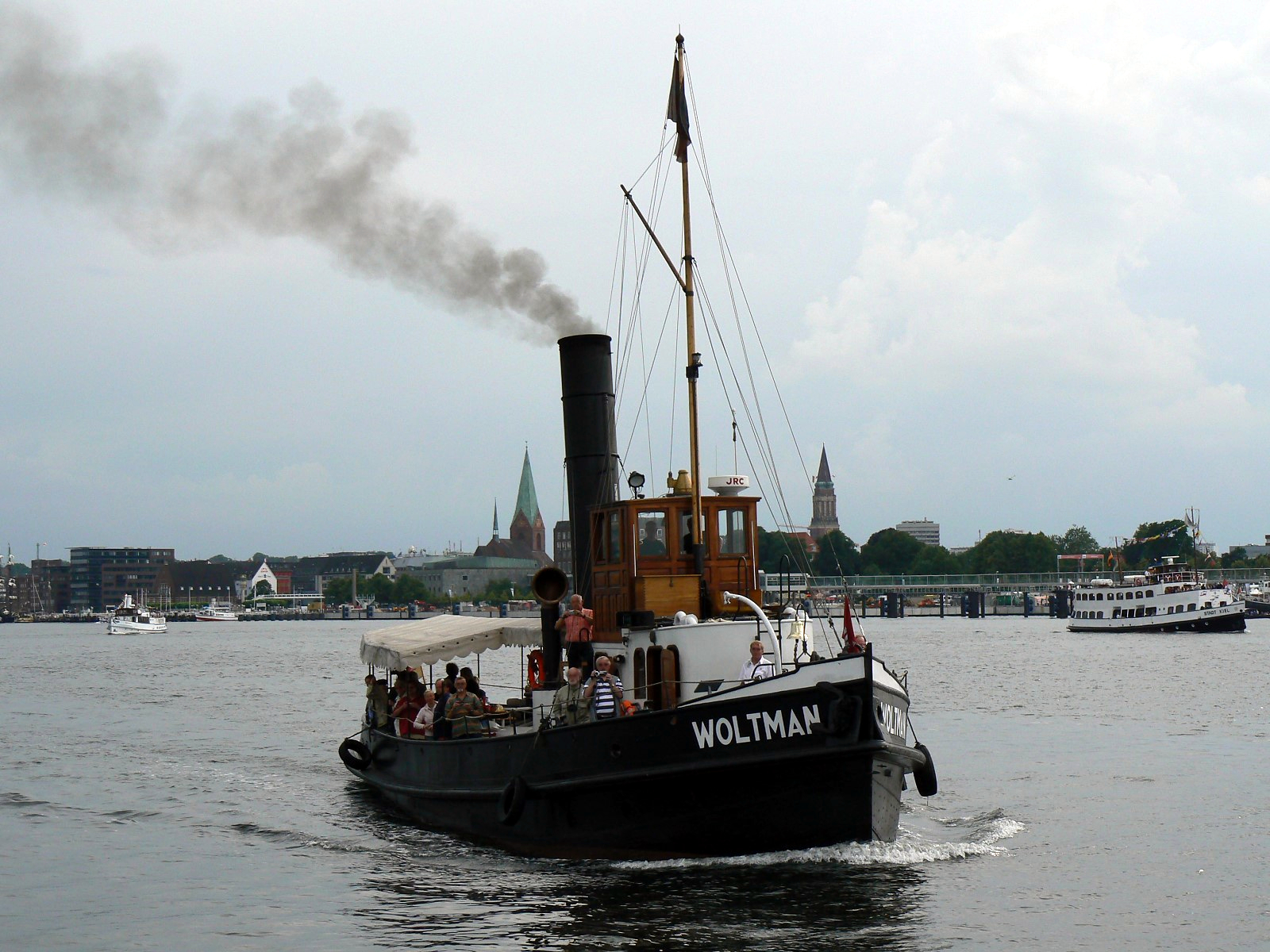 Schleppdampfer Woltman auf der Kieler Woche 2007. Baujahr 1904.